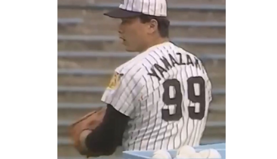 1986年阪神タイガース｢死のロード｣より